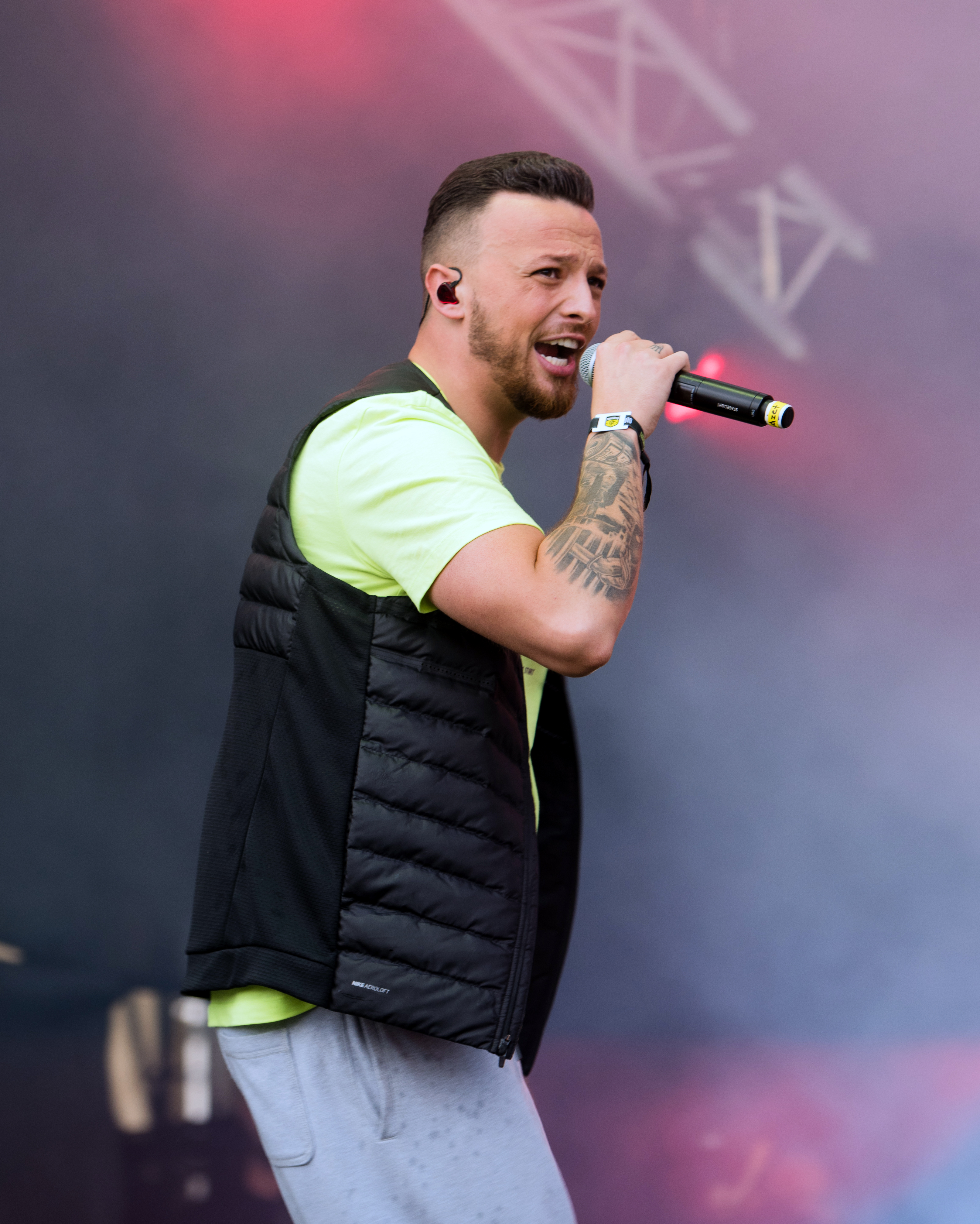 Azet live auf dem Openair Frauenfeld 2019